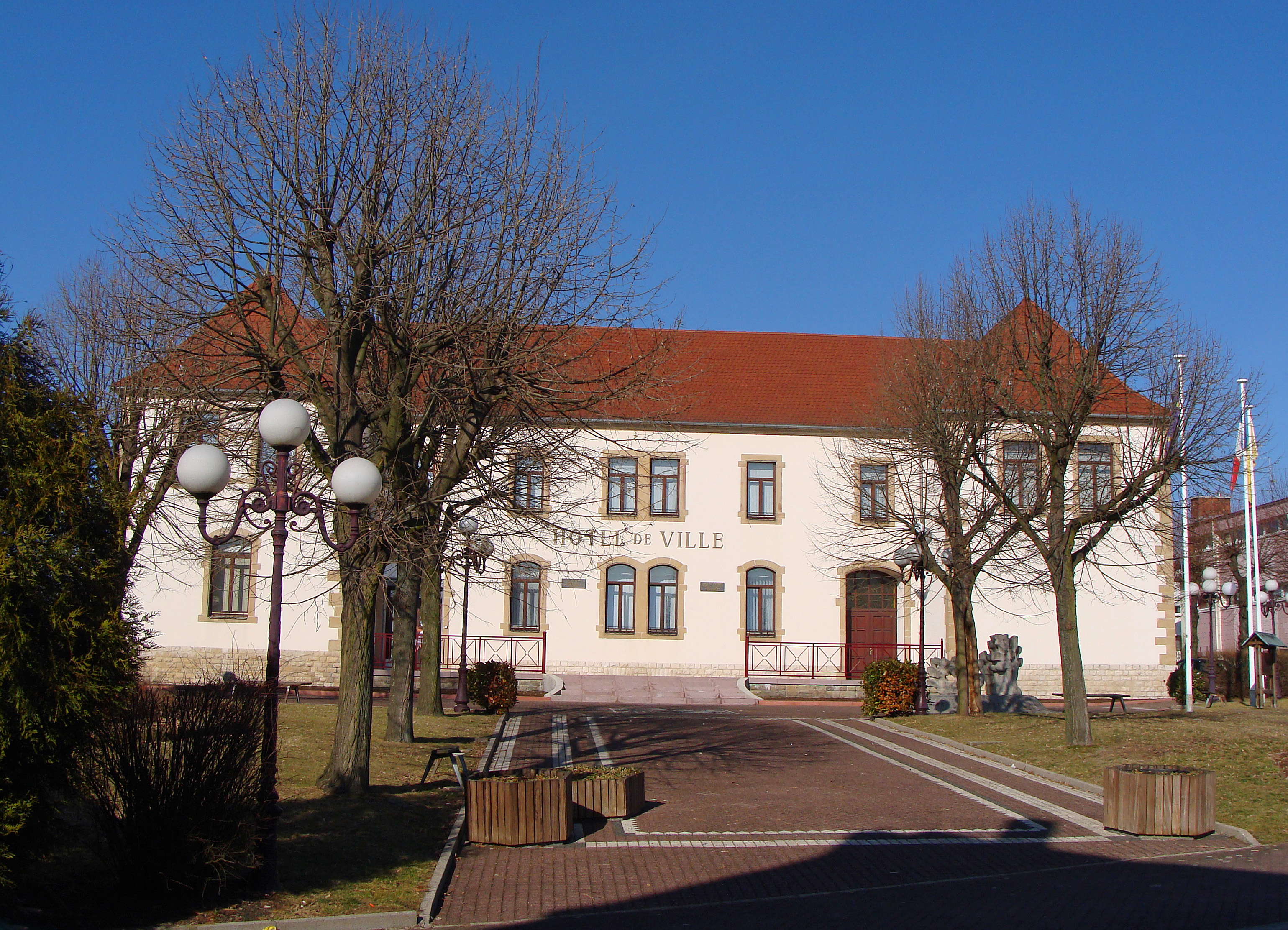 L'Hôpital (Moselle). Place de la Mairie et Hôtel de Ville